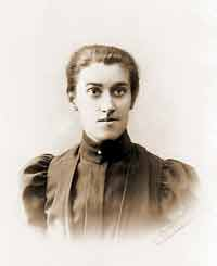 Ольга Антоновна Добиаш-Рождественская(1874—1939) — российский и советский историк—медиевист, палеограф и писательница